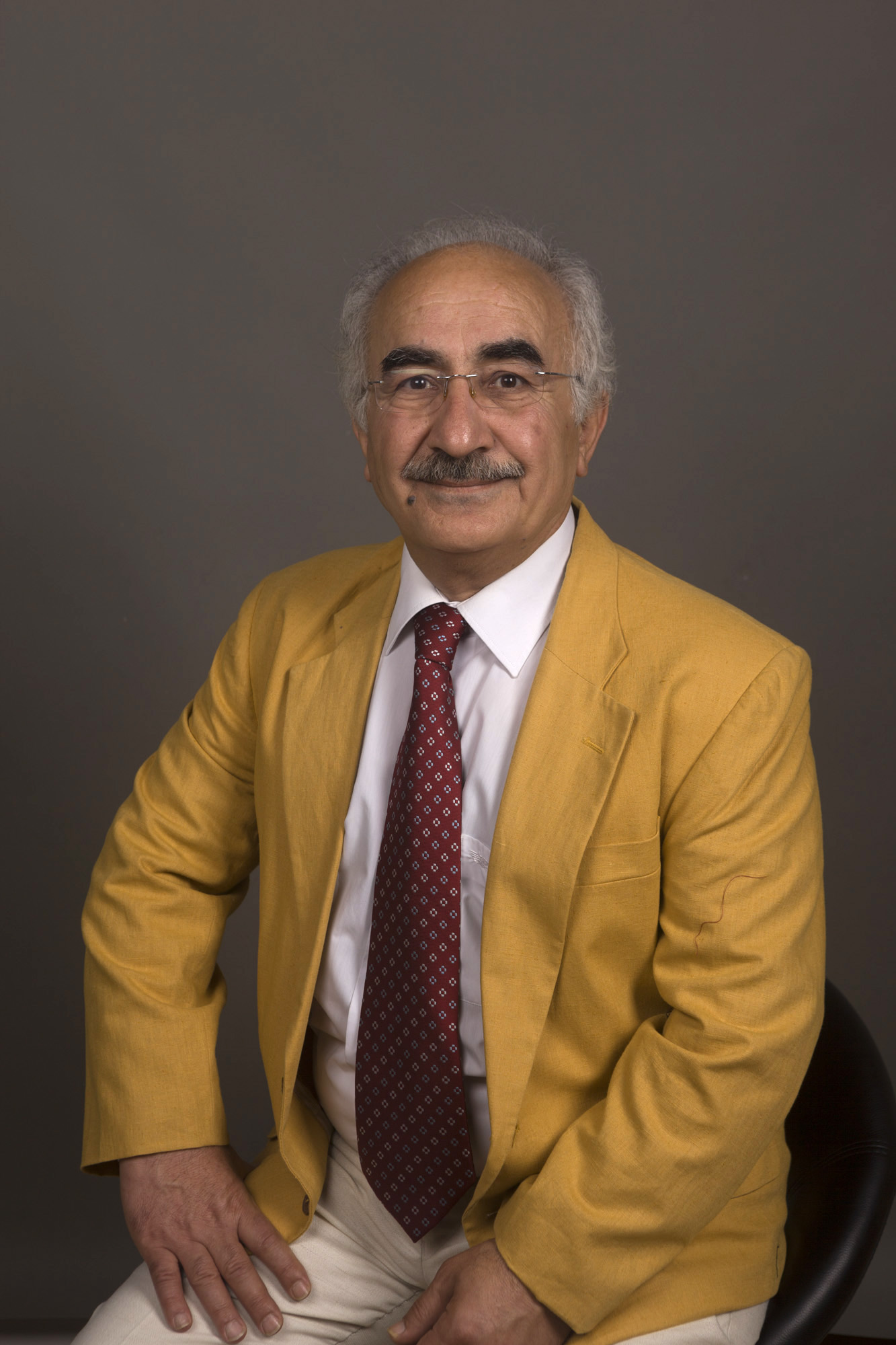 Yekty Uzunoglu